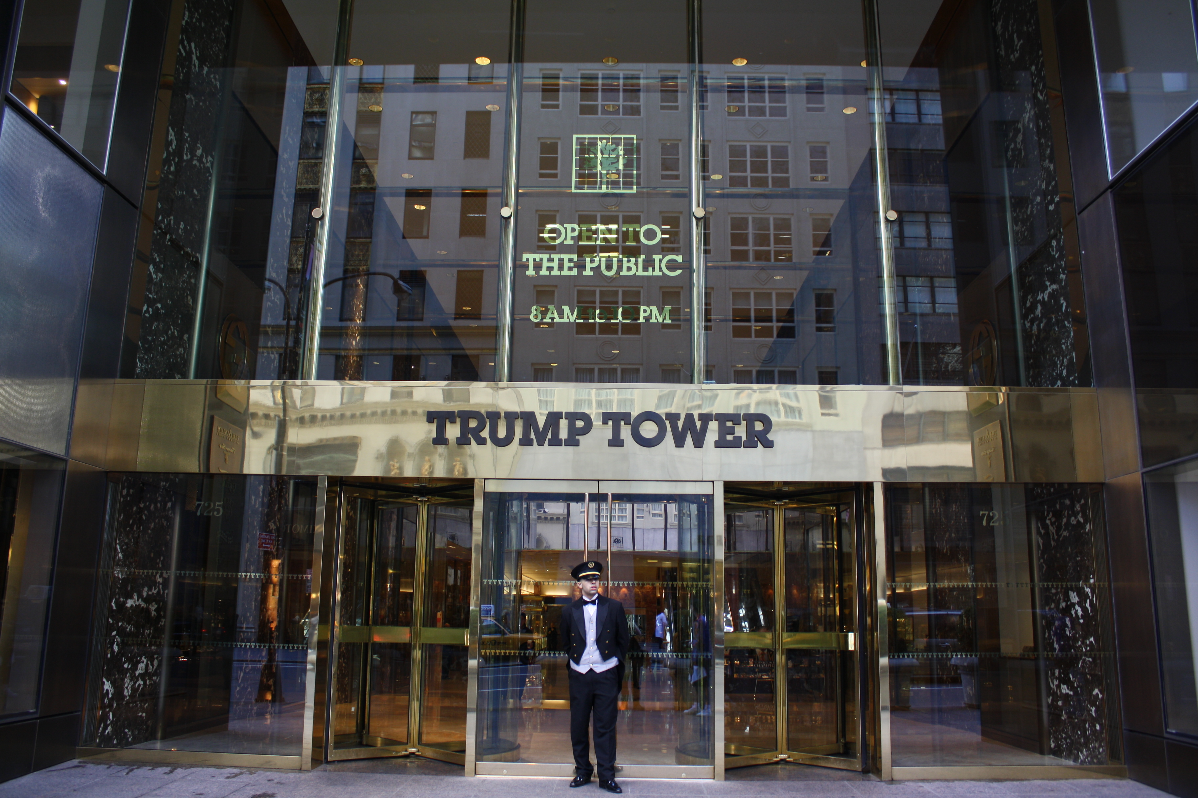 New York City; 2009